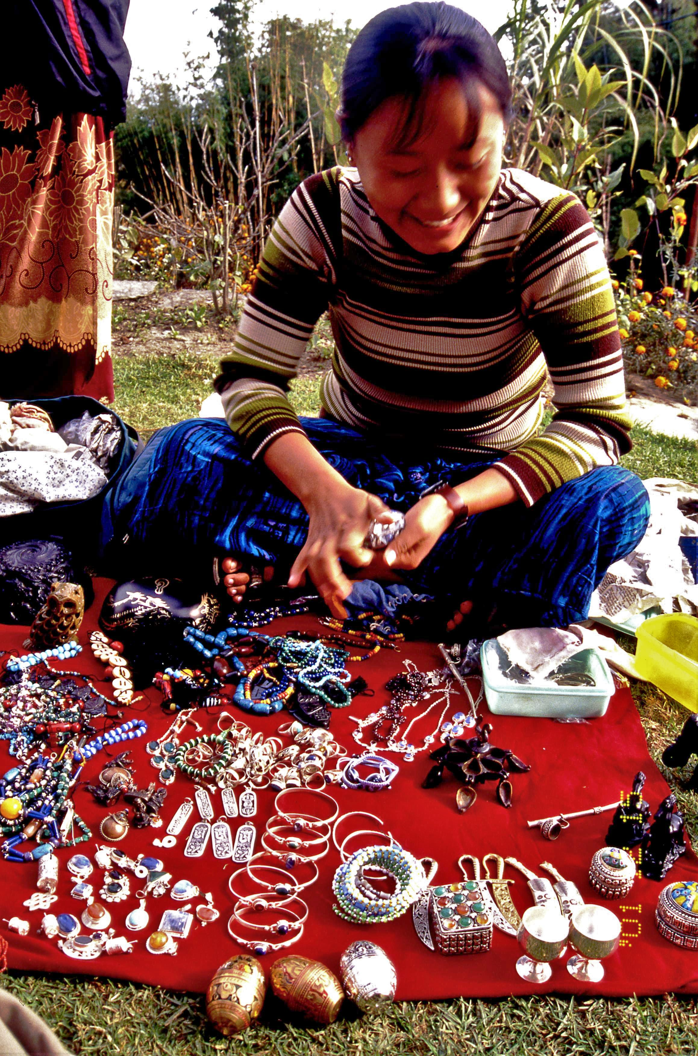 チベット人の物売り nepal